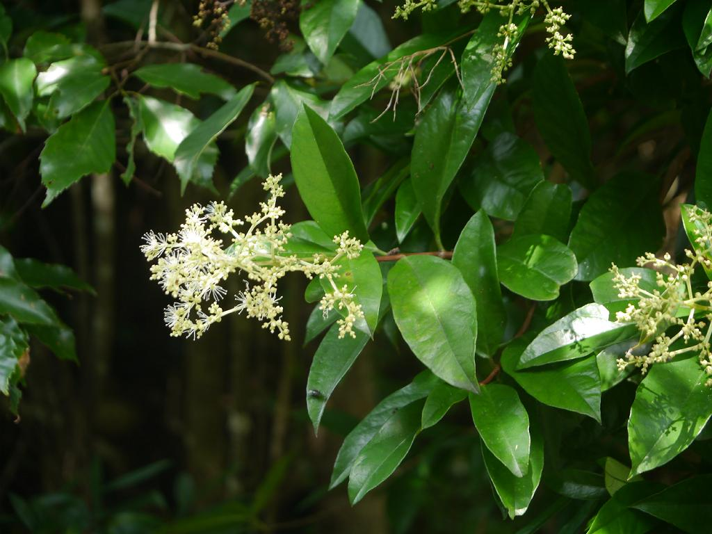 Pileotegia viburnoides：シマユキカズラ 2015/09/05 和歌山県田辺市：Tanabe City. Wakayama Pref. Japan